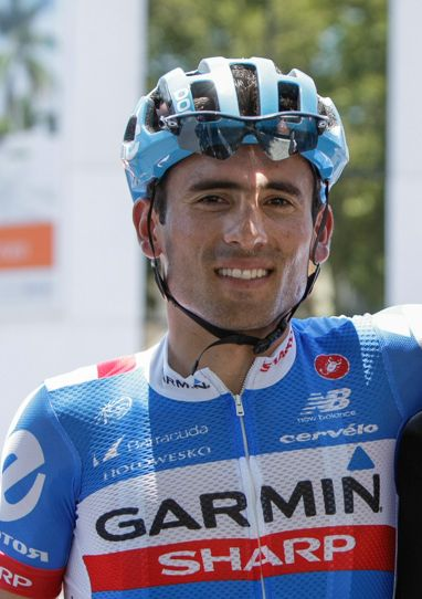 Janier Acevedo, antes de empezar el Tour de San Luis 2014 y debutando en el Garmin-Sharp